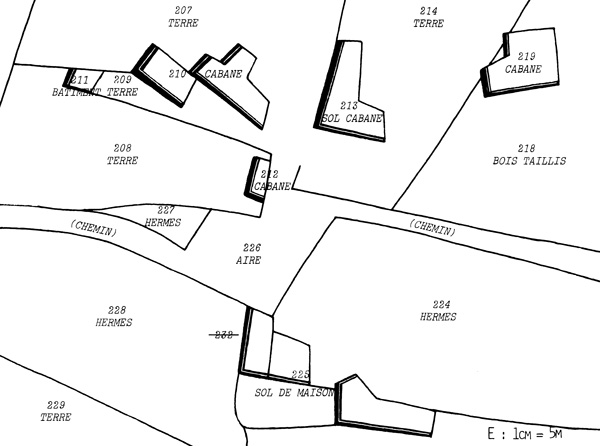 Articulation sud du hameau des Savournins d'après le cadastre de 1809. Aujourd'hui : le "Village des Bories". Dessin de Christian Lassure.